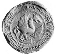 Lackfi (I.) István erdélyi vajda pecsétje 1348-ból